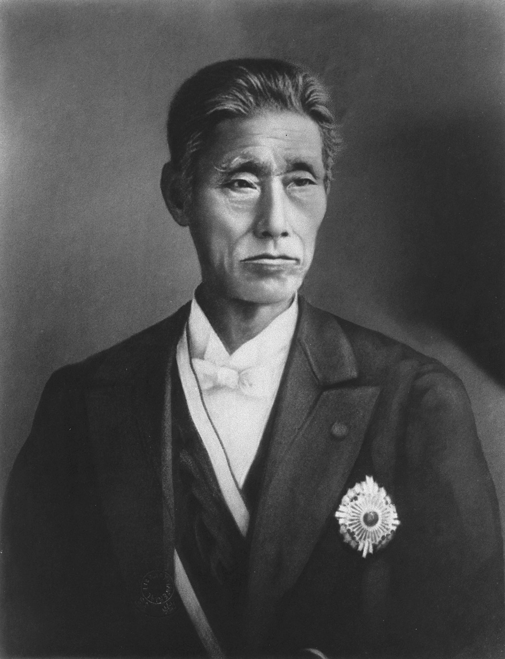 Portrait of Fukuoka Takachika (福岡孝弟, 1835 – 1919)